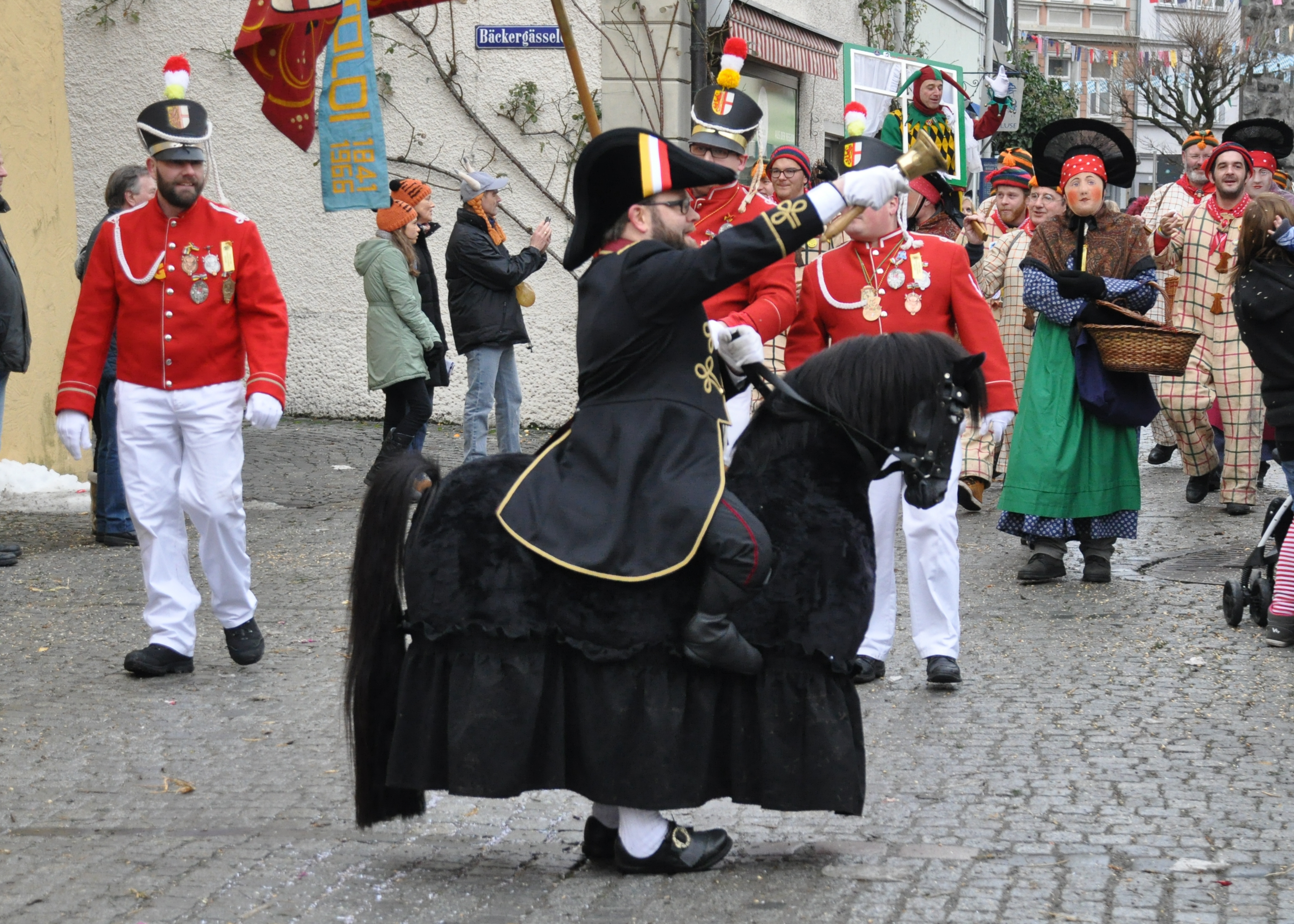 Narrenzunft Narrizella Ratoldi 1841 e. V.; Narrengarde Fotografiert beim Großen Narrentreffen der Vereinigung Schwäbisch-Alemannischer Narrenzünfte (VSAN) in Lindau; Narrensprung am Sonntag, 24. Januar 2016.